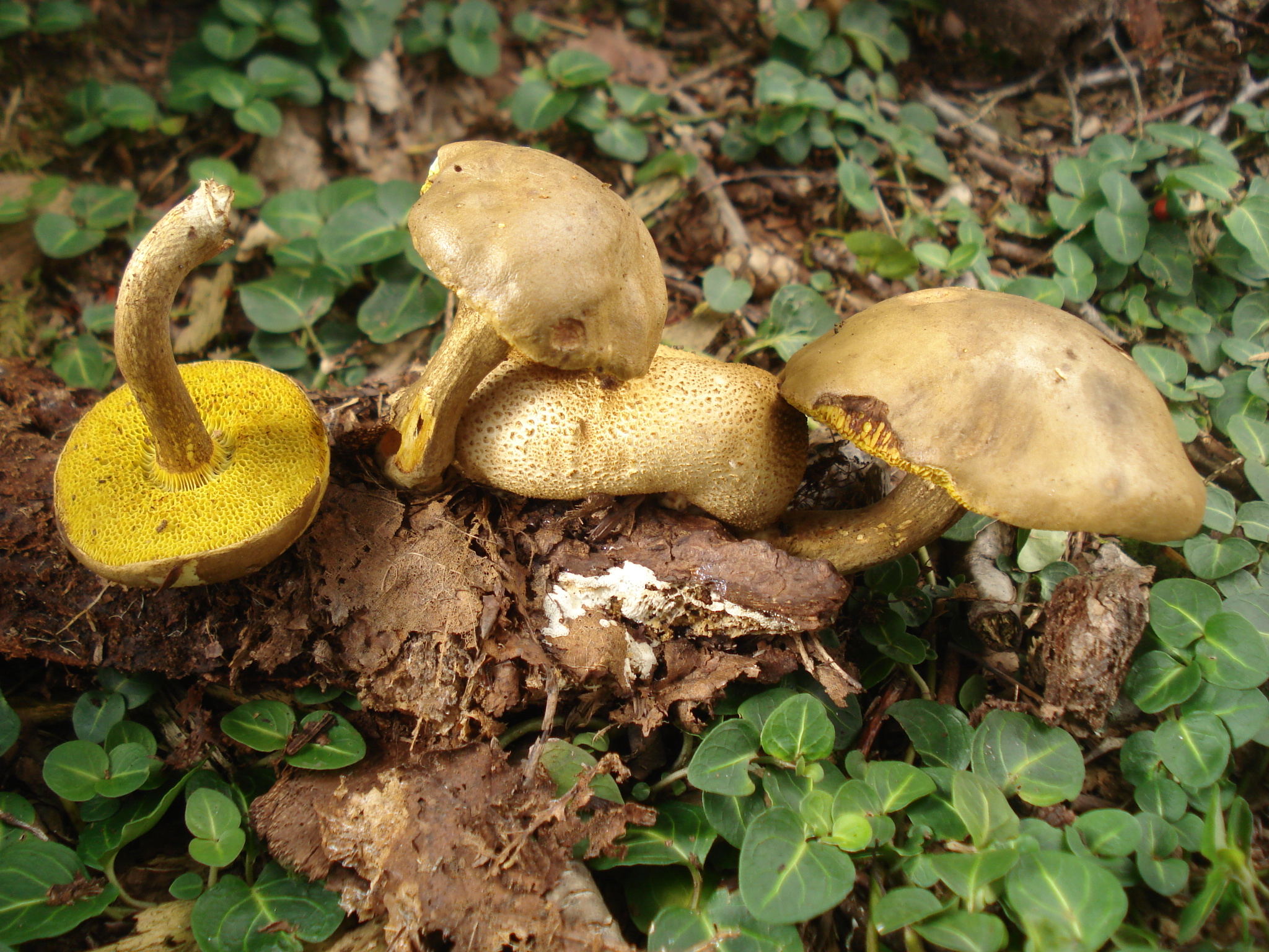 Pseudoboletus parasiticus (Bull.) Sutara